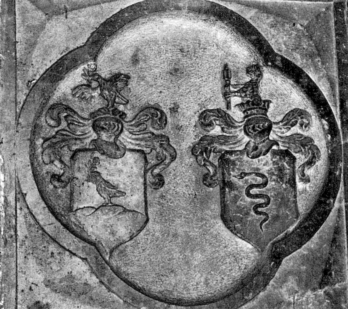 Rumantsch: Crap sepulcral da podestat Giachen de Balliel a Teglio; Cuntegn